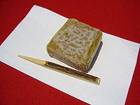 Kintsuba